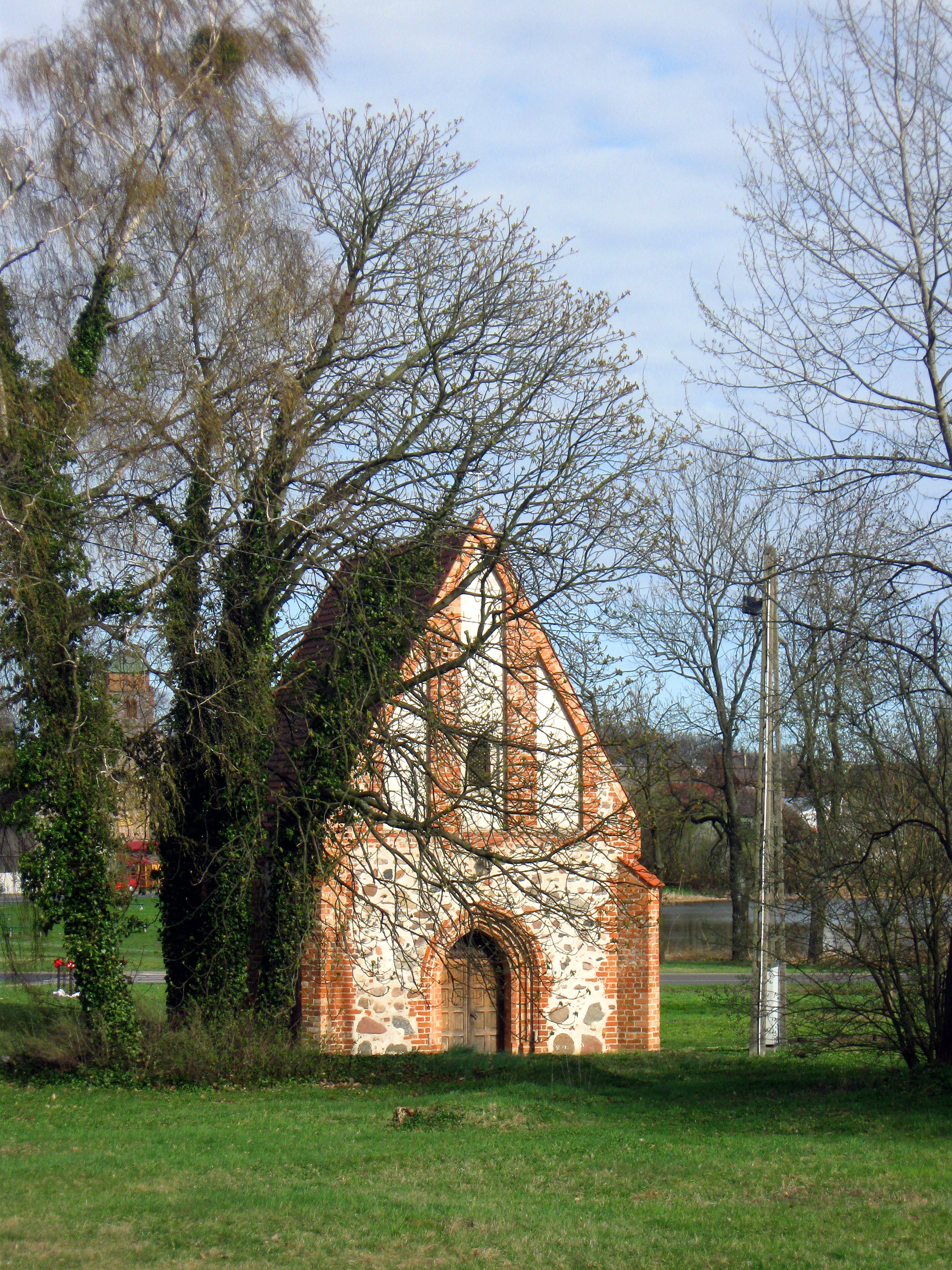 Banie - kaplica (decyzja: ruina) św. Jerzego, kon. XV